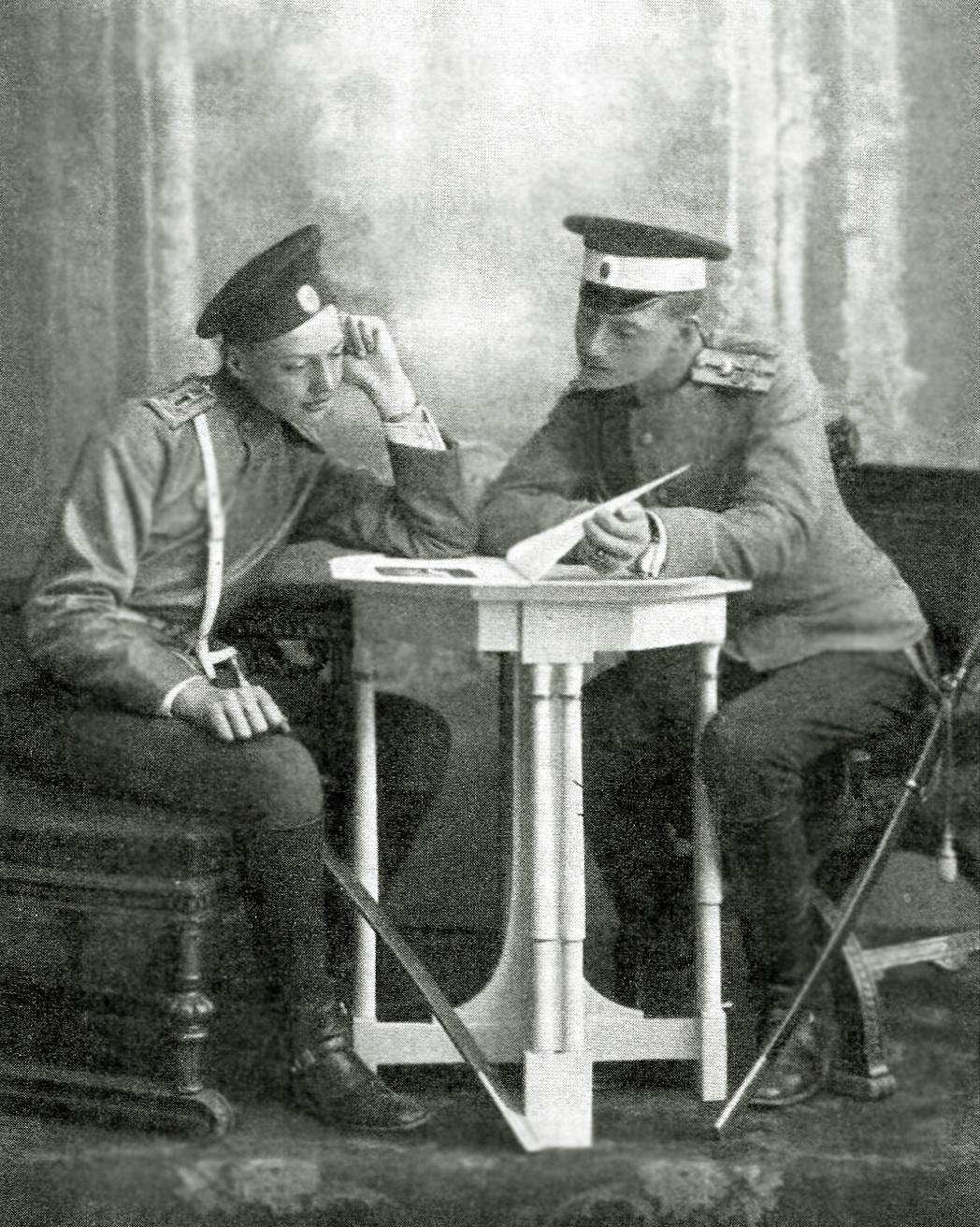 Игорь и Константин Константиновичи Романовы. Скан фото, приведённого в книге : Завьялова Л.,Орлов К.Великий князь Константин Константинович и великие князья Константиновичи. СПб.2009. ISBN 978-5-93898-225-3